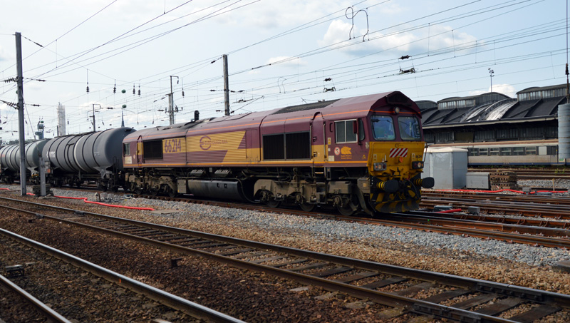 Class 66 : 66214 d'Euro Cargo Rail traversant la gare d'Amiens